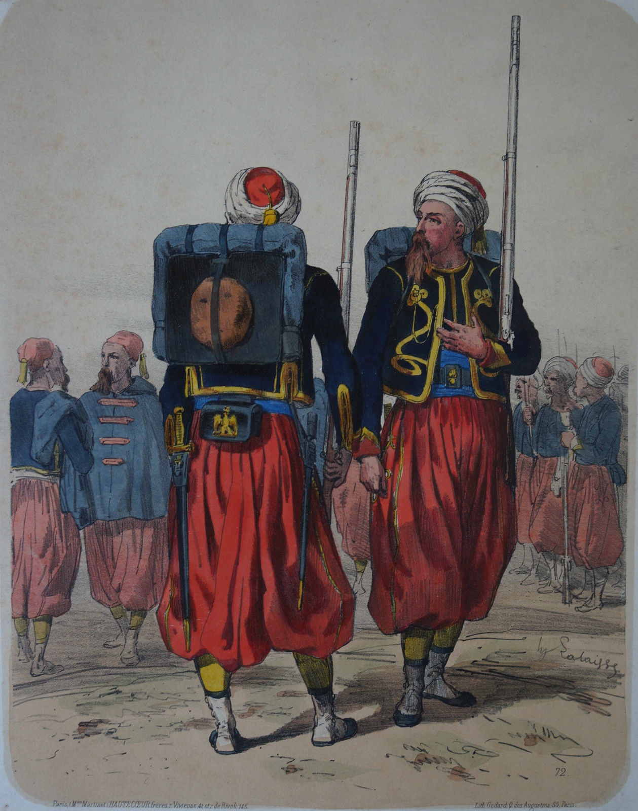 Garde impériale zouave (v. 1860), lithographie de Lalaisse.